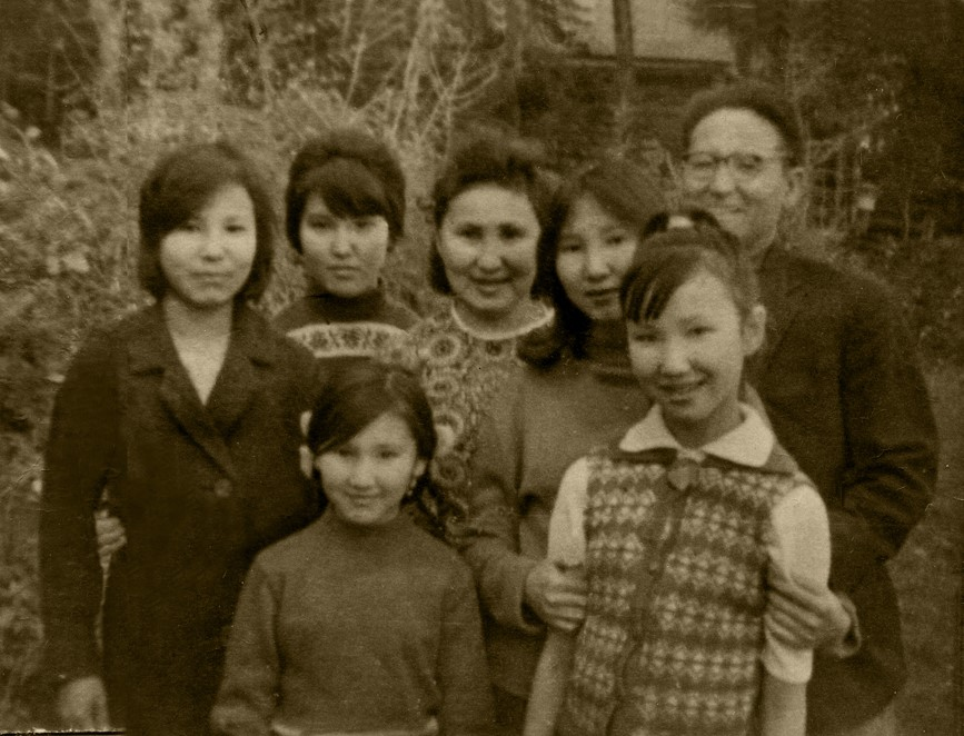 Писатель Лев Львович Габышев с семьей